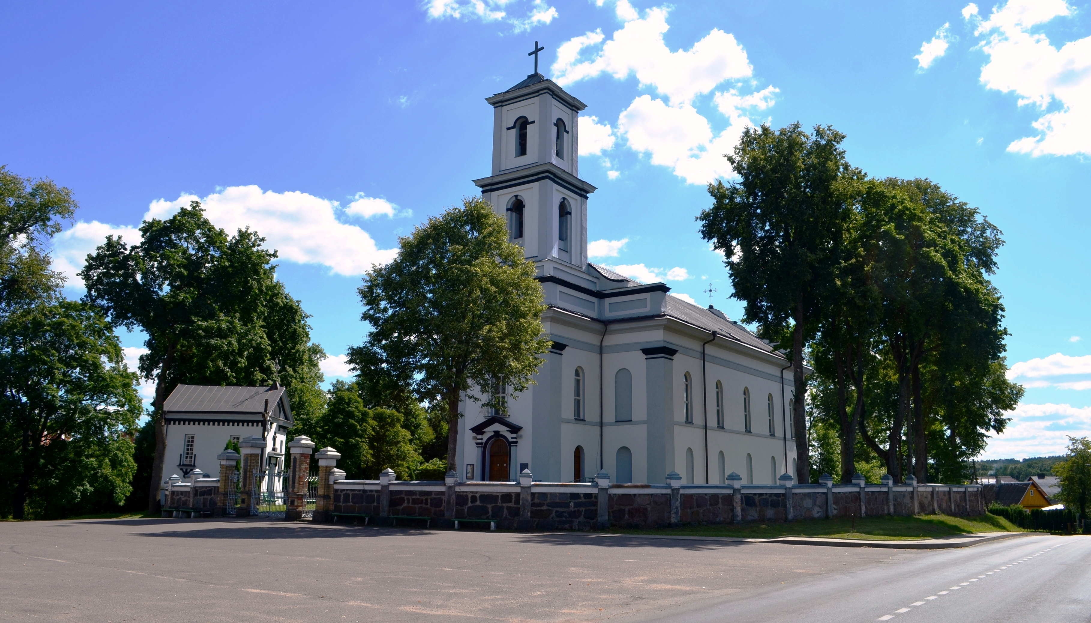 Nemenčinės bažnyčia, Vilniaus raj.